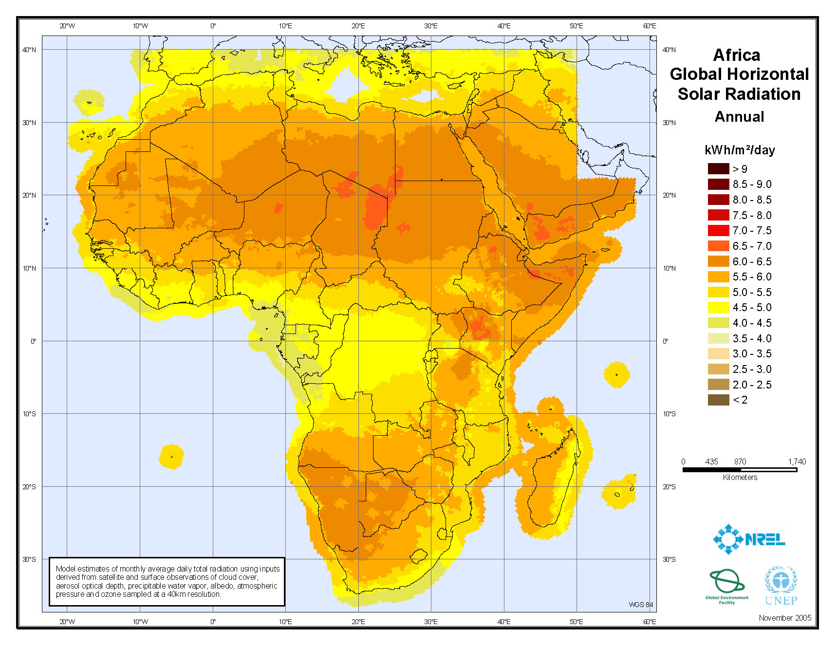 Ensoleillement moyen quotidien en Afrique